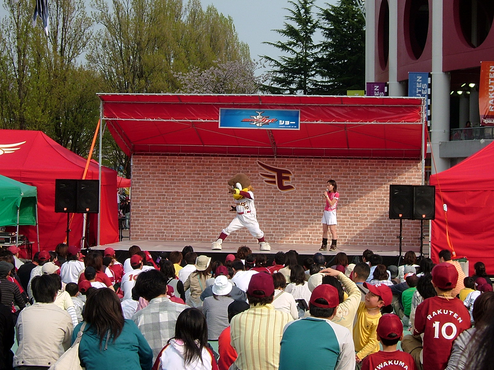 Kamen Rider Kabuto